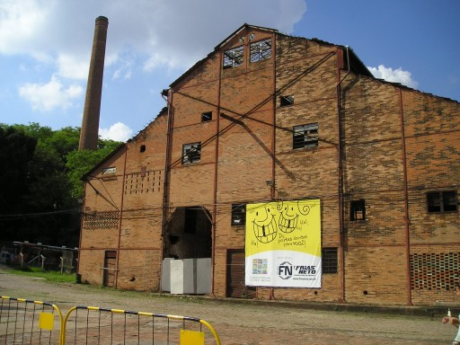 Lugar onde se faz o Salão Internacional de Humor de Piracicaba